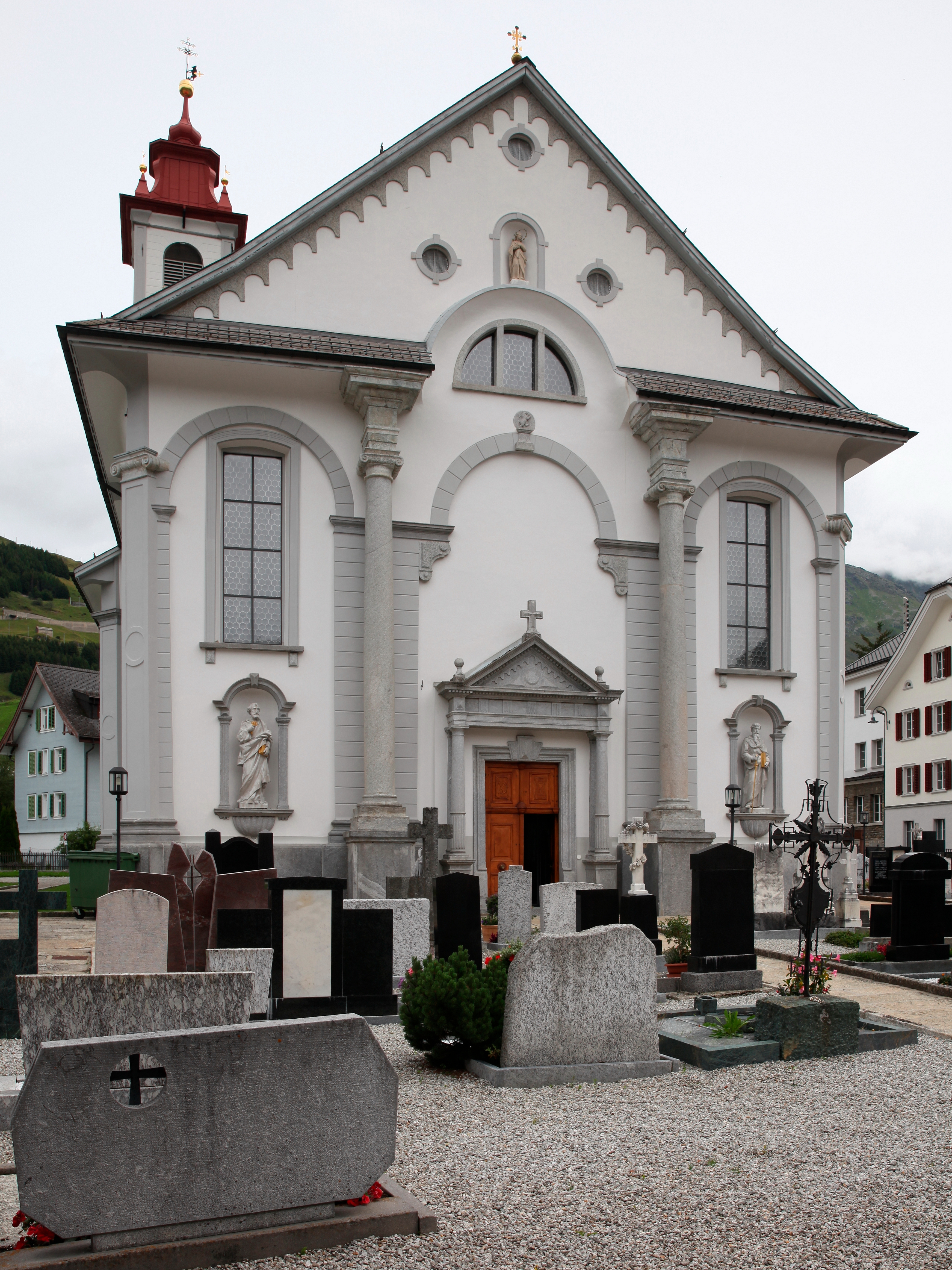 Andermatt, Katholische Pfarrkirche St. Peter und Paul